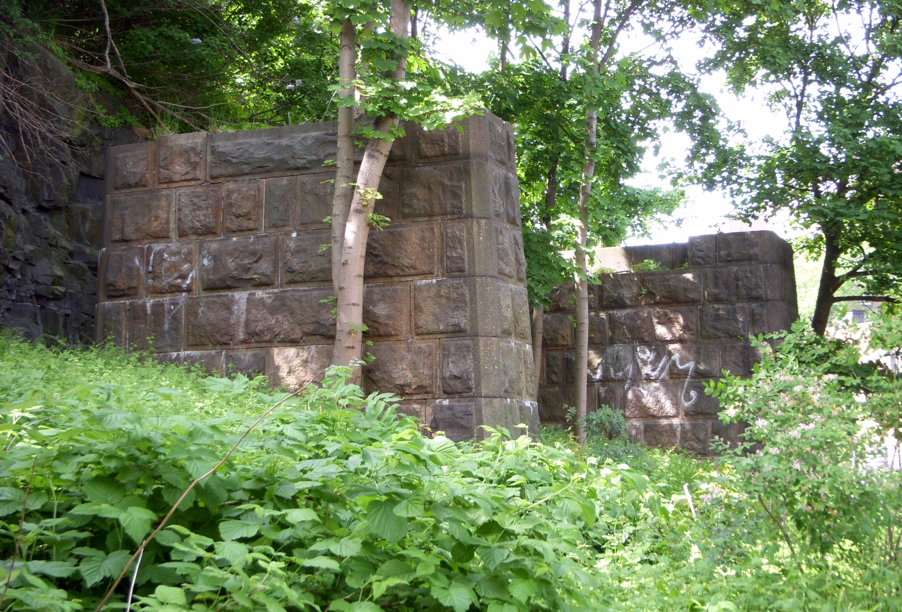 Övergivna bropelare för Saltsjöbanans viadukt vid Londonviadukten åå Södermalm.